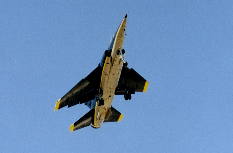 SAAF Mirage F1AZ 233